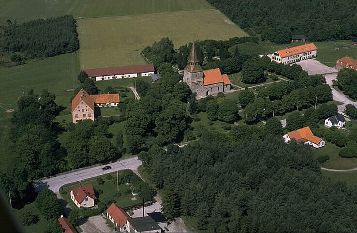 Motiv: Havdhems kyrka Nyckelord: Flygbilder, Riksintressen Kategori: KyrkbyHavdhems kyrka